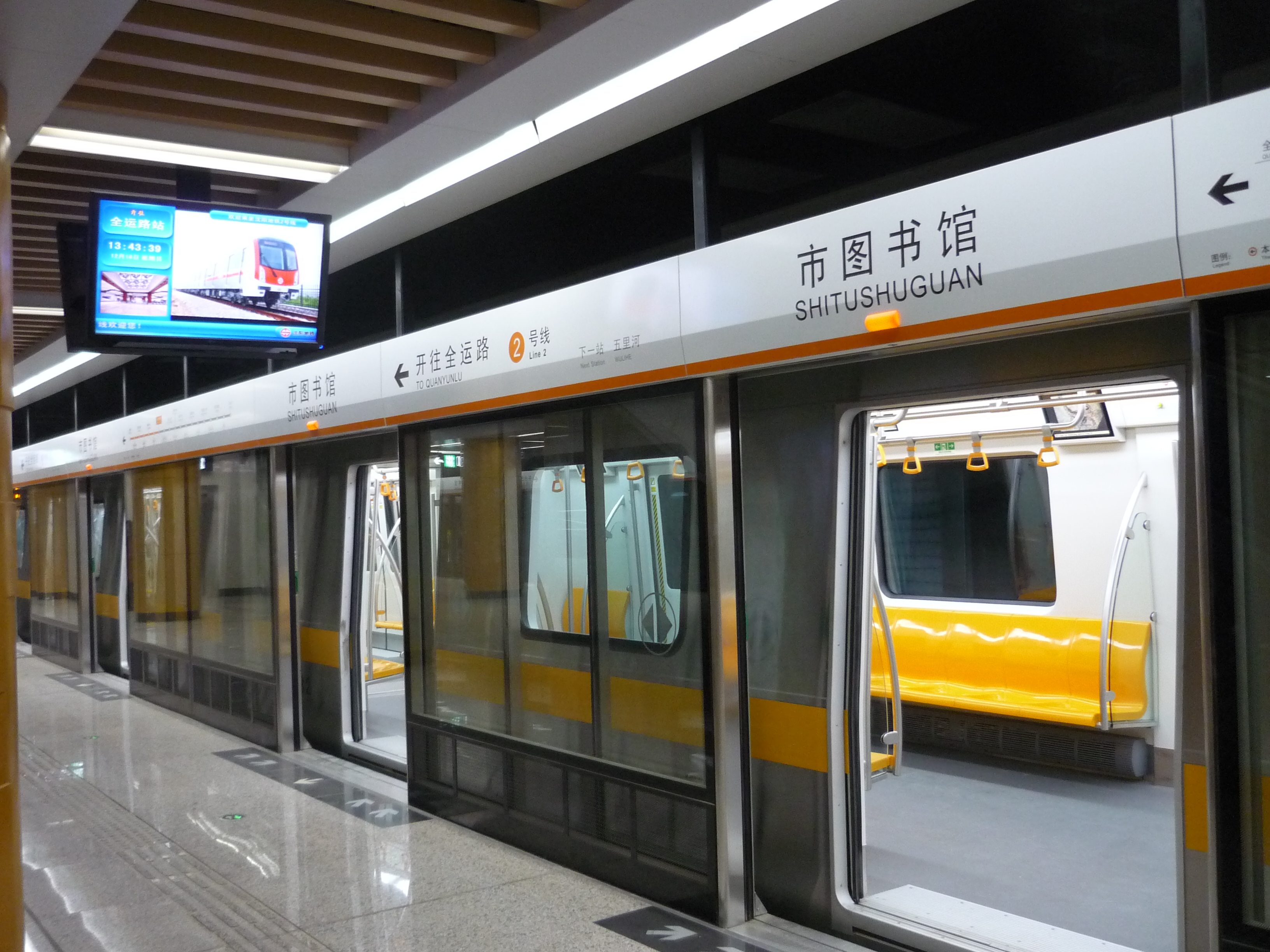 瀋陽地下鉄2号線の市図書館駅構内